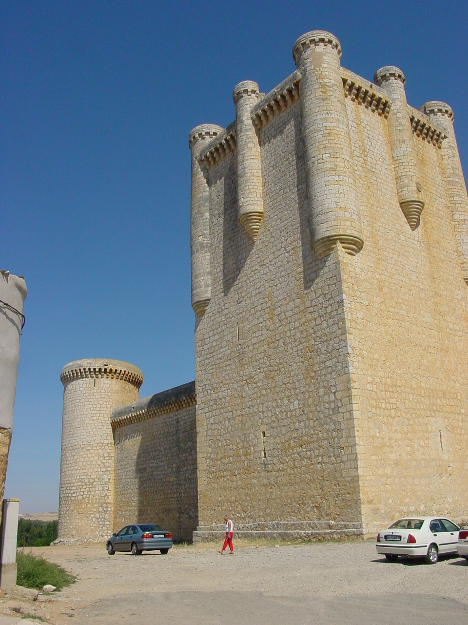 Castillo de Torrelobatón en la provincia de Valladolid en España.